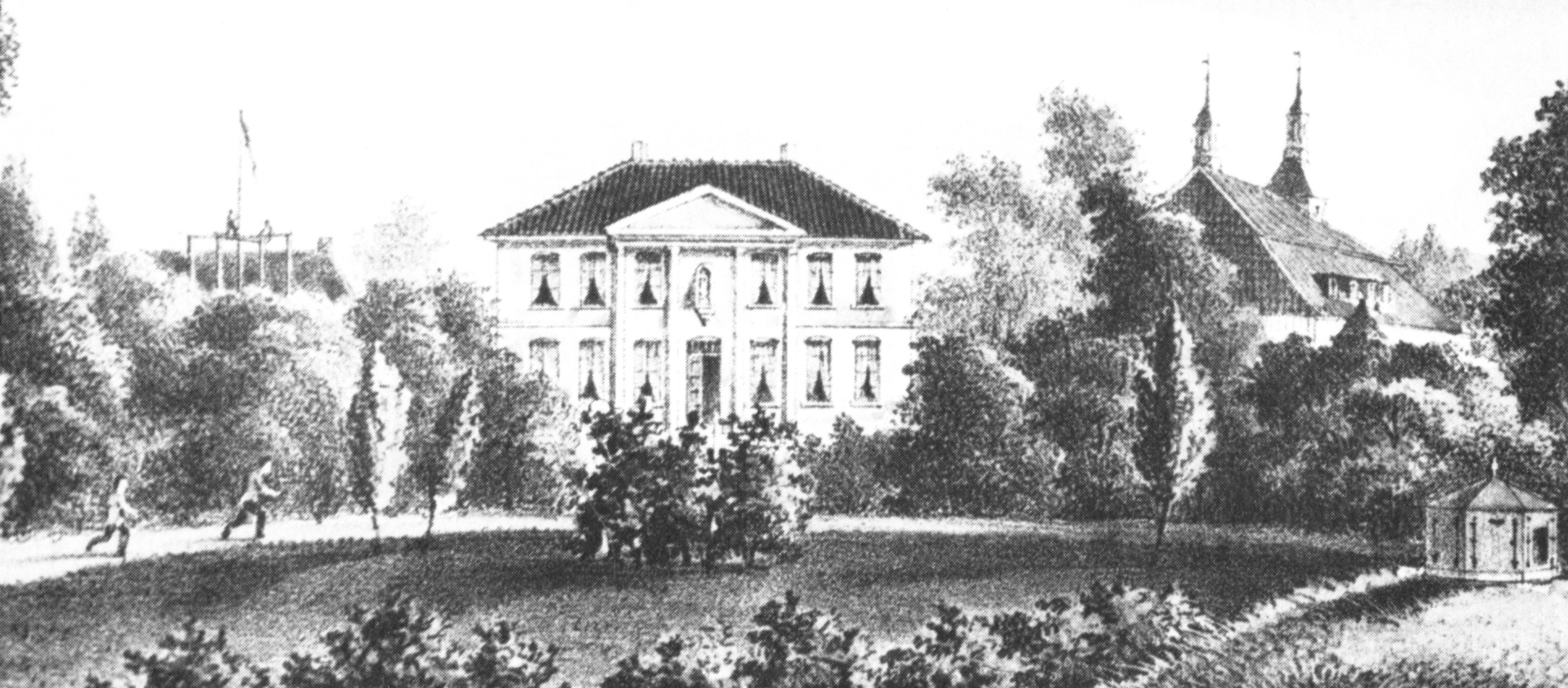 Hauptgebäude in der Moltkestrasse, aus dem Jahr 1852, Zeichnung um 1855.